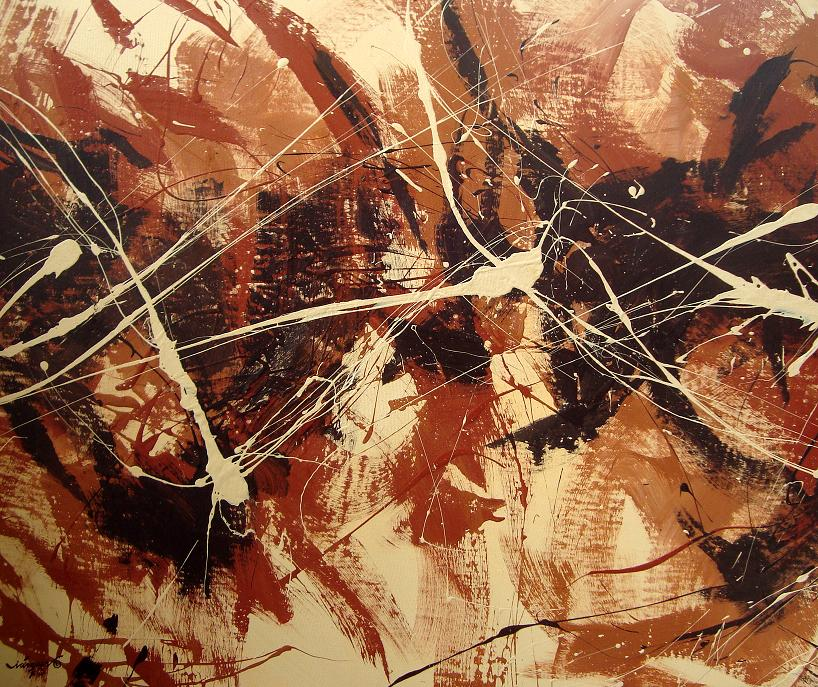 GENESIS 1 MIXTA SOBRE LIENZO DE 100 X 120 CM. OBRA DEL RECONOCIDO ARTISTA PLASTICO INTERNACIONAL ISRAEL VAZQUEZ ROMAN